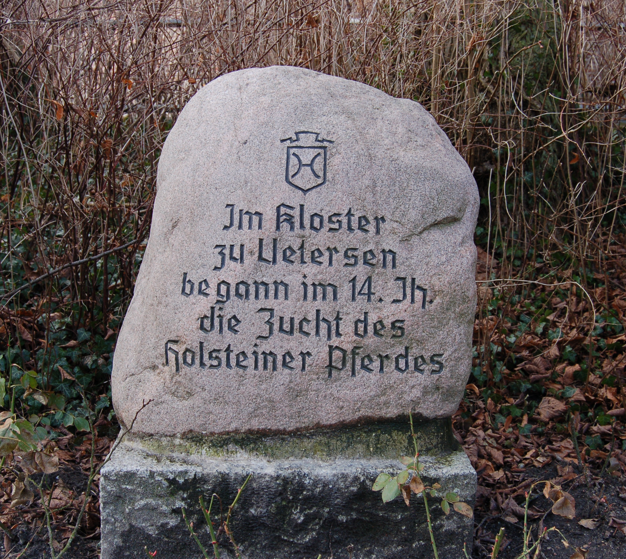 Gedenkstein an den Beginn der Zucht des Holsteiner Pferdes im Kloster von Uetersen